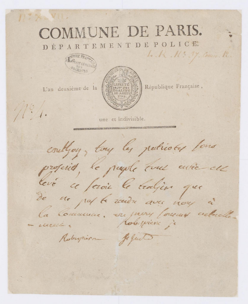 Billet autographe de Robespierre appelant Couthon à se rendre à la Commune, signé de Robespierre aîné, Robespierre jeune et Saint-Just